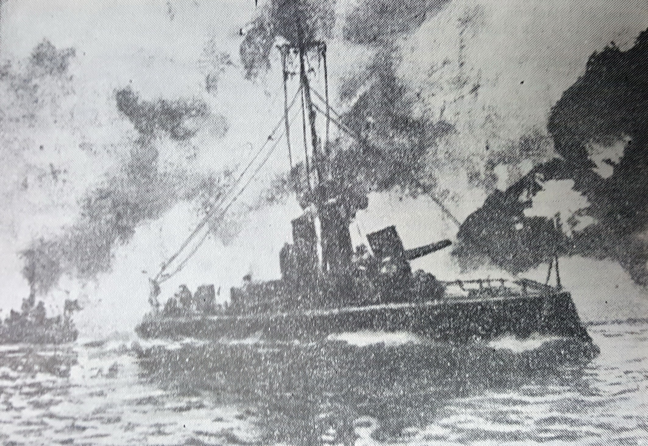 1916 - Trageri executate de Flotila de Dunare in sprijinul Turtucaiei pictura de Dumitru Stiubei